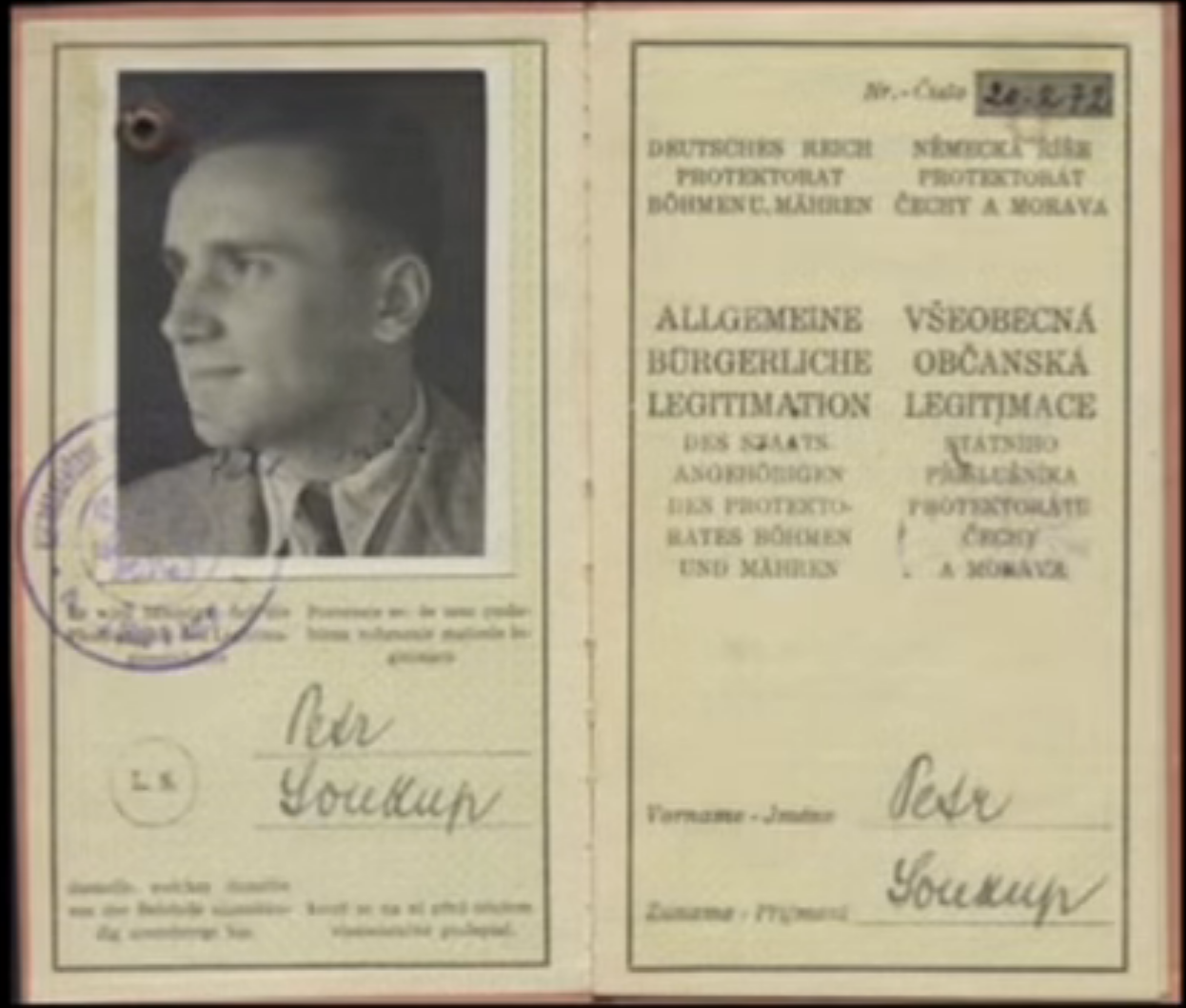 Falešné doklady výsadkáře Františka Pavelky, na jméno "Petr Soukup".